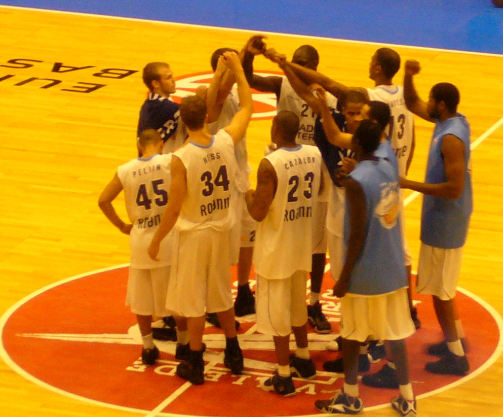 L'équipe Euroleague de la Chorale de Roanne après le match aller contre le Fenerbace Ulker (à Clermont-Ferrand)